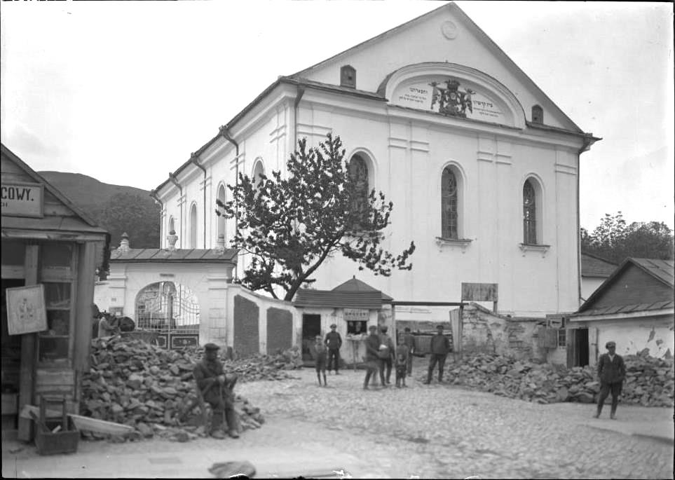 Большая синагога в Кременце.